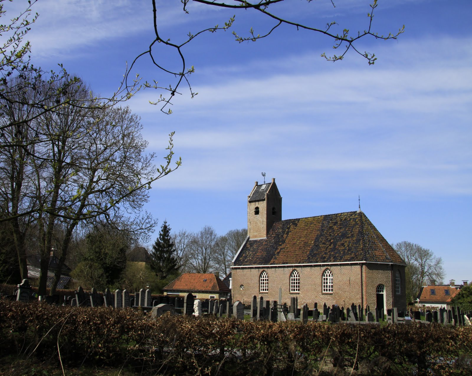 N.H. Johannes kerk Veenwouden.